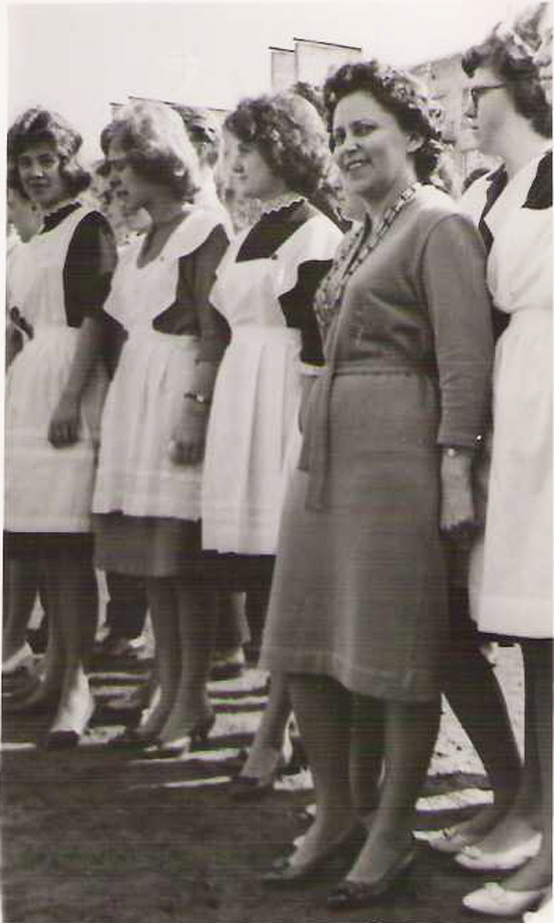 Л. М. Предтеченская с ученицами 397 школы, 1964 год